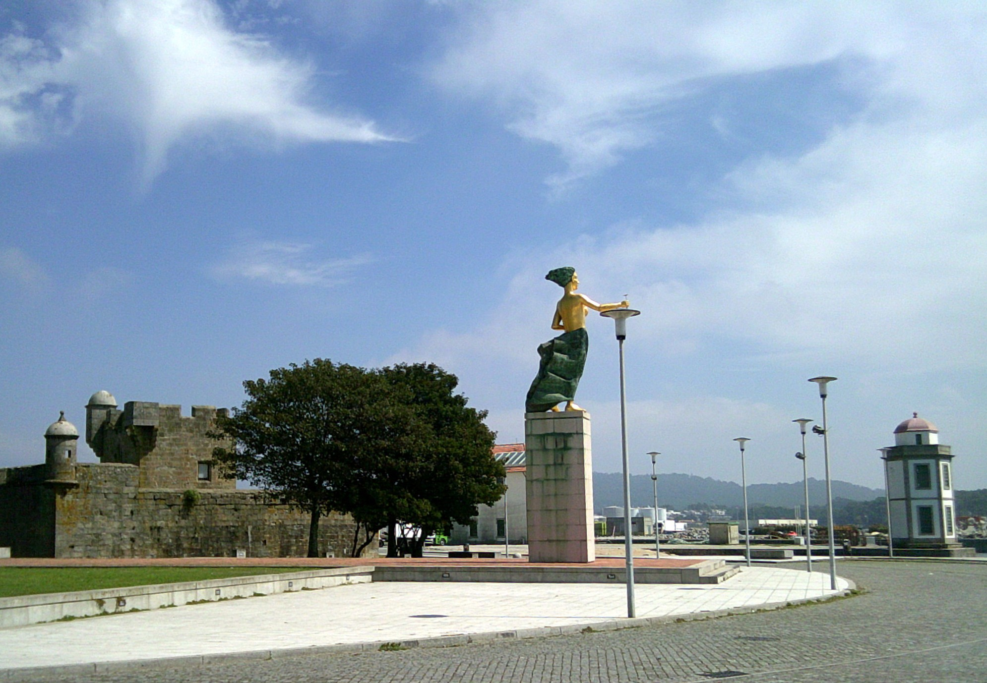 Da esquerda para a direita: Torre da Roqueta (Forte de Santiago da Barra), Homenagem à Mulher Vianesa e Torre de Vigia da Barra, freguesia de Monserrate, concelho e distrito de Viana do Castelo, Portugal.